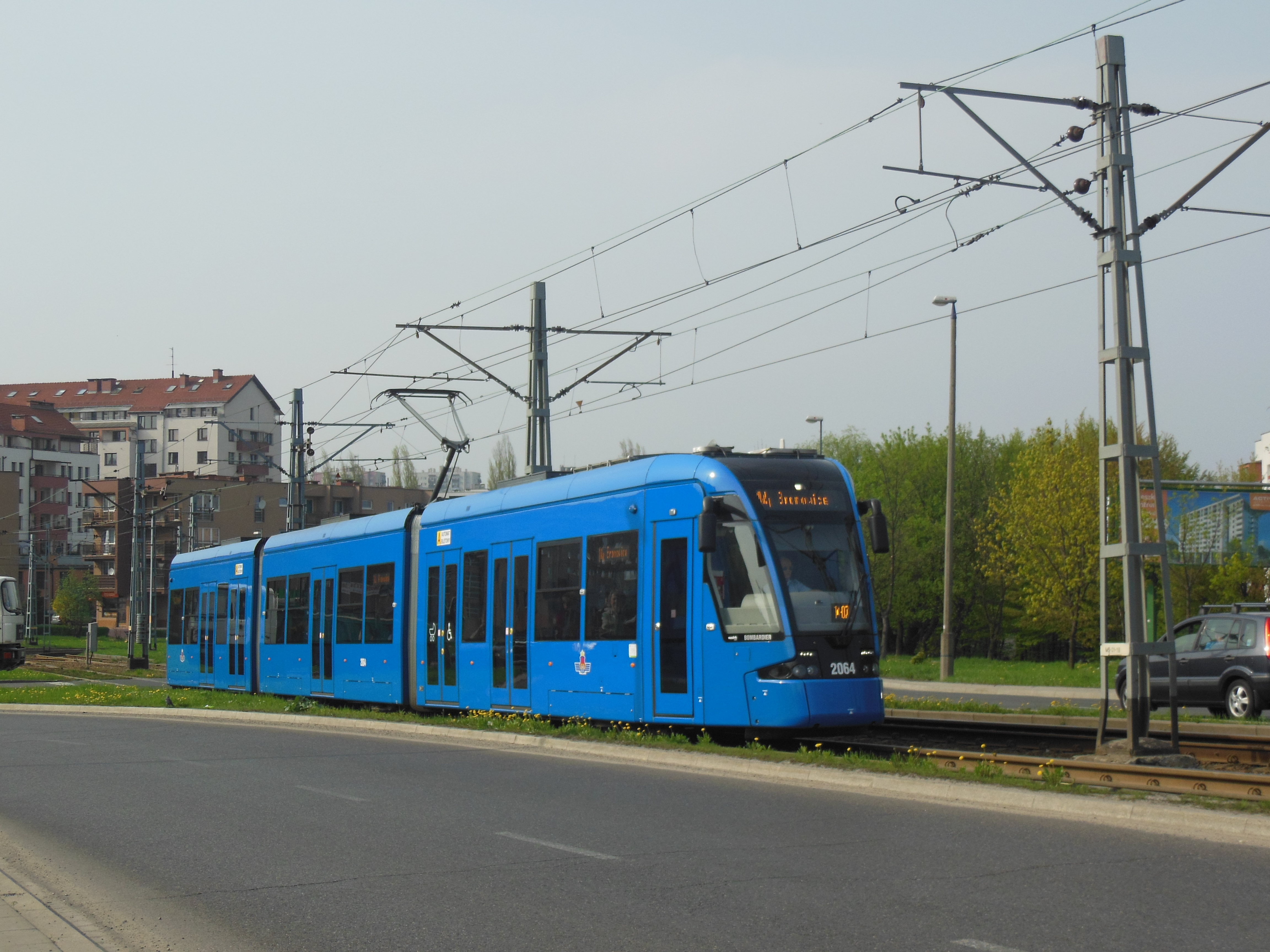 Bombardier NGT8 na linii 14 na Rondzie Piastowskim w Krakowie.